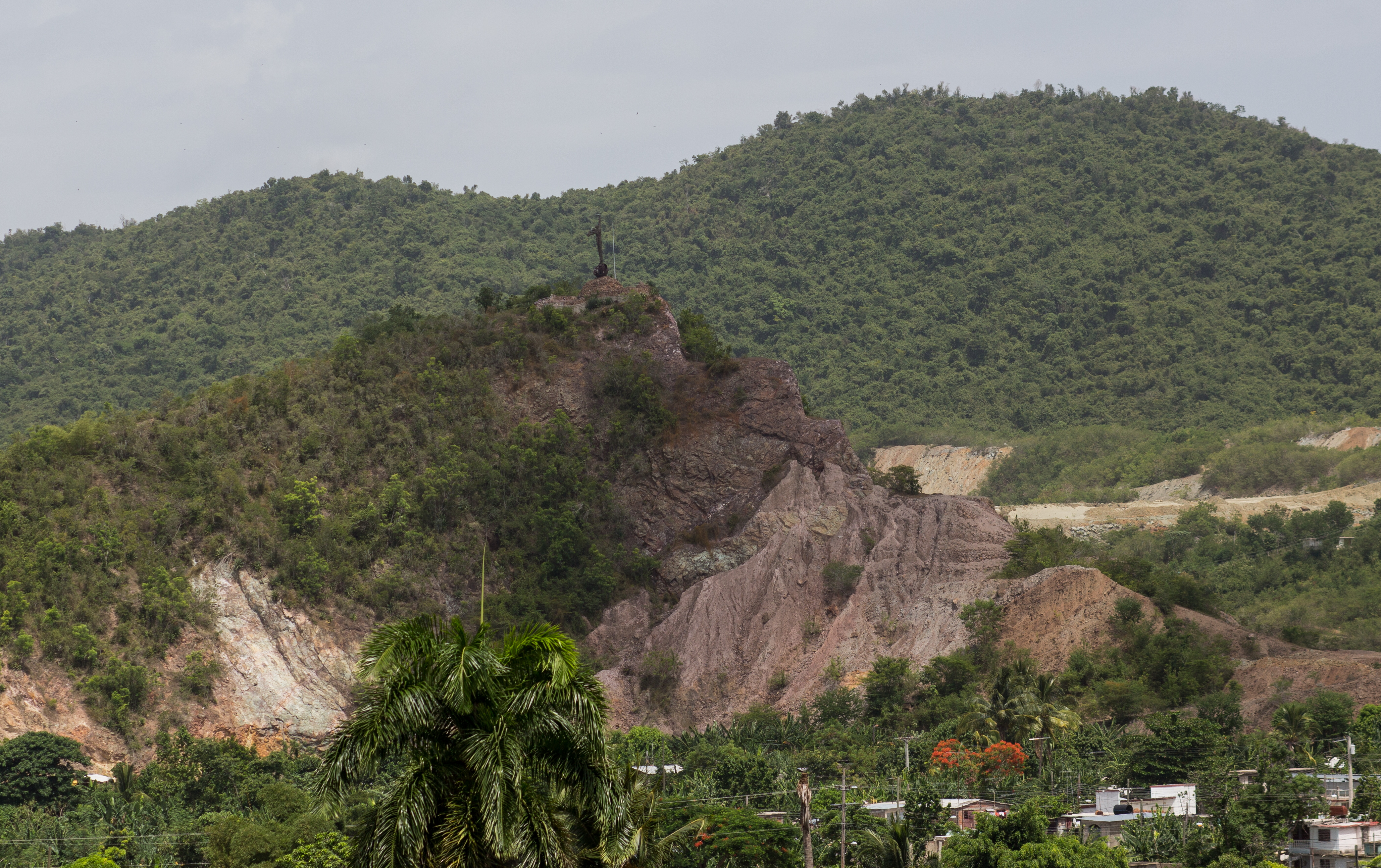 Denkmal für die entlaufenen Sklaven bei El Cobre, Santiago de Cuba